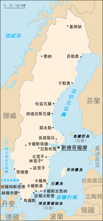 瑞典地圖。